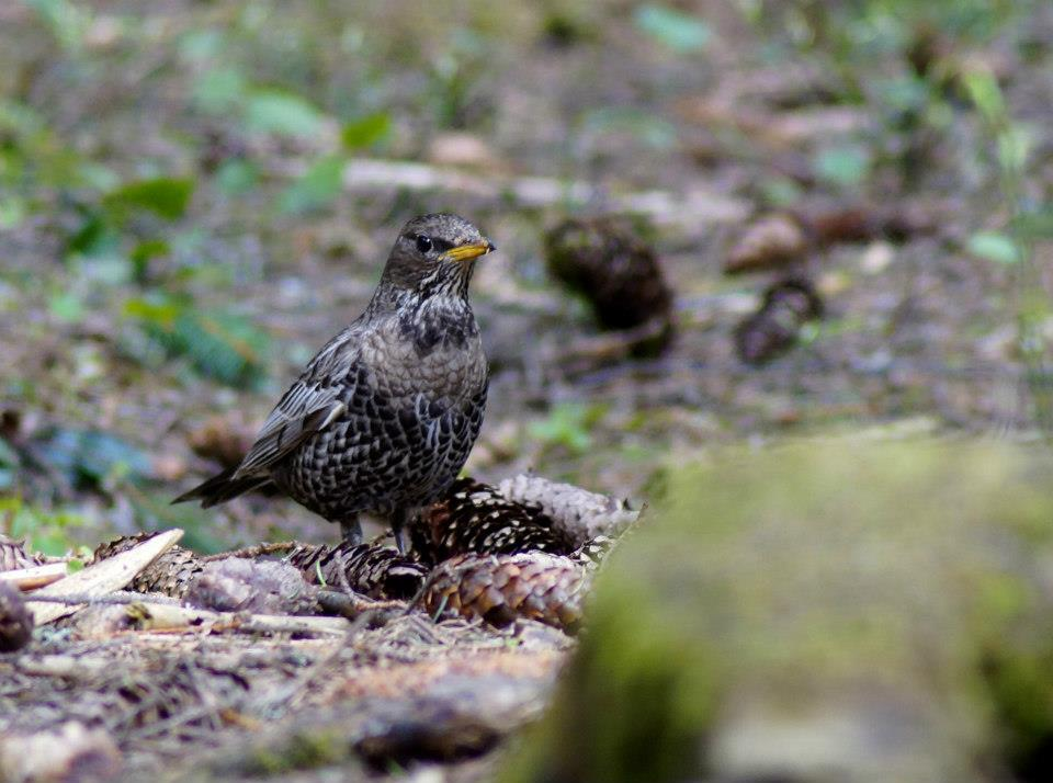 Drozd obrożny (Turdus torquatus), Tatry